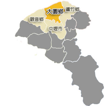 桃園縣大園鄉行政區劃。